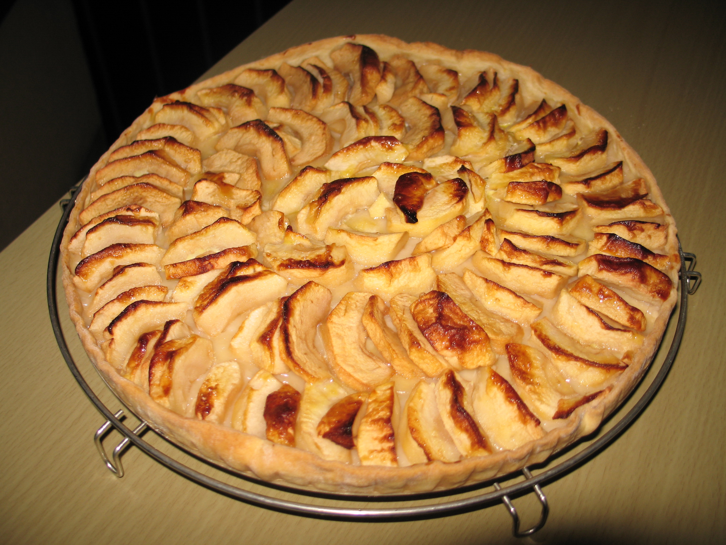 Яблычны пірог